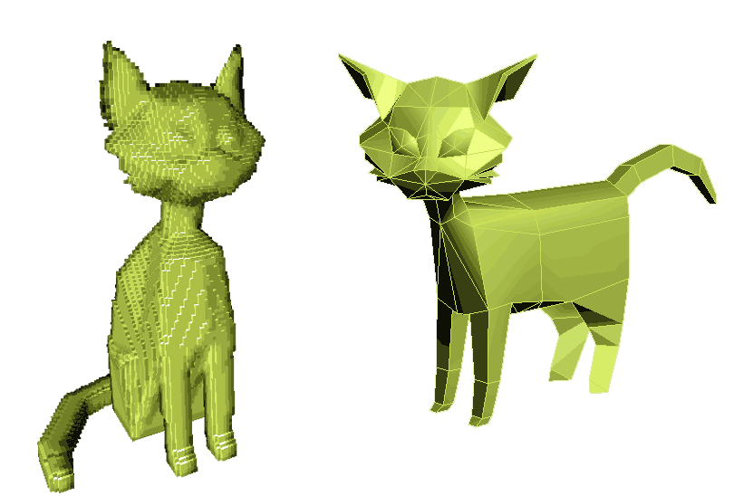 Воксельная модель кошки и полигональная модель кота.